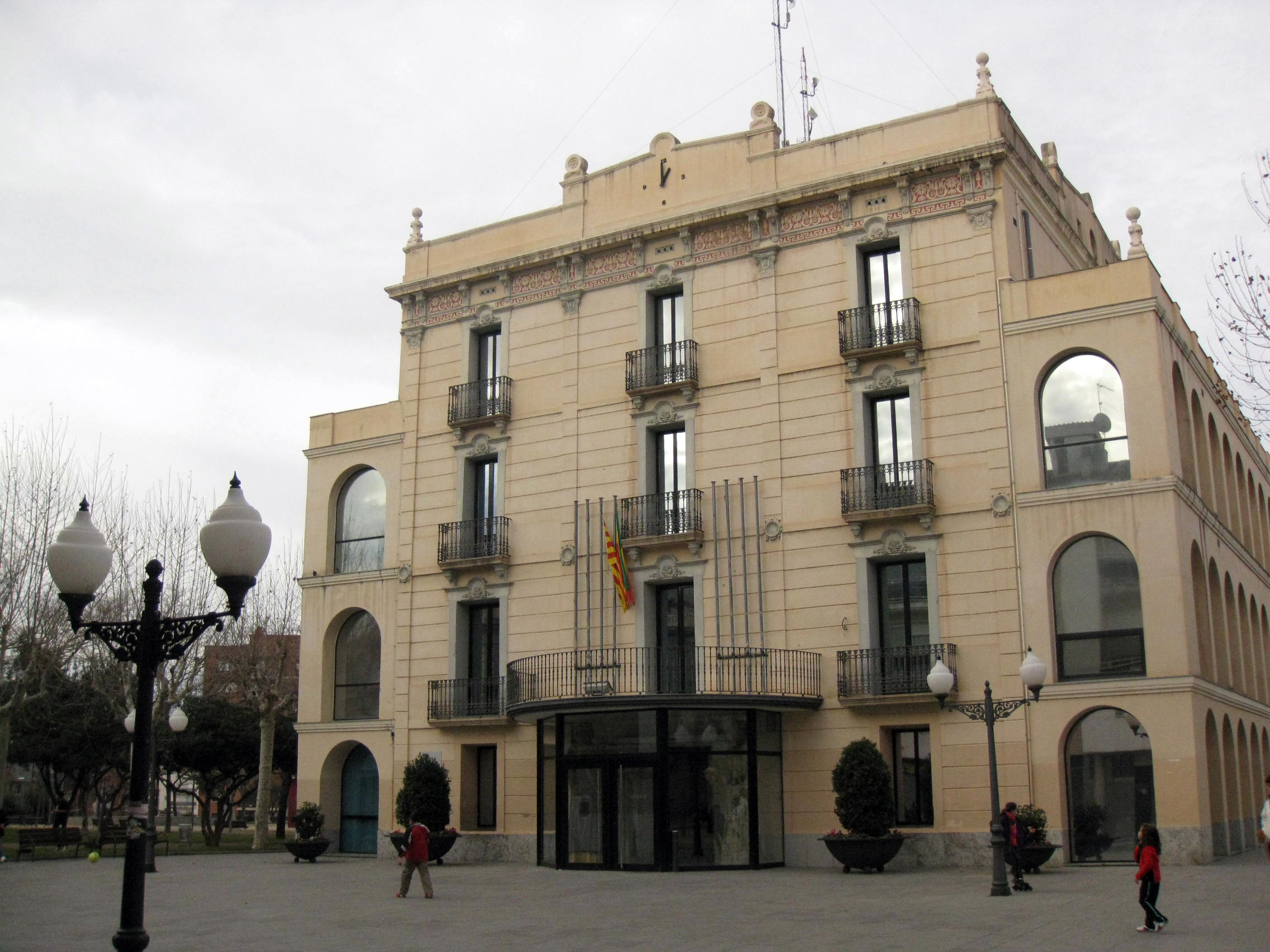 Ajuntament d'Olesa de Montserrat Object location41° 32′ 38.32″ N, 1° 53′ 28.76″ E